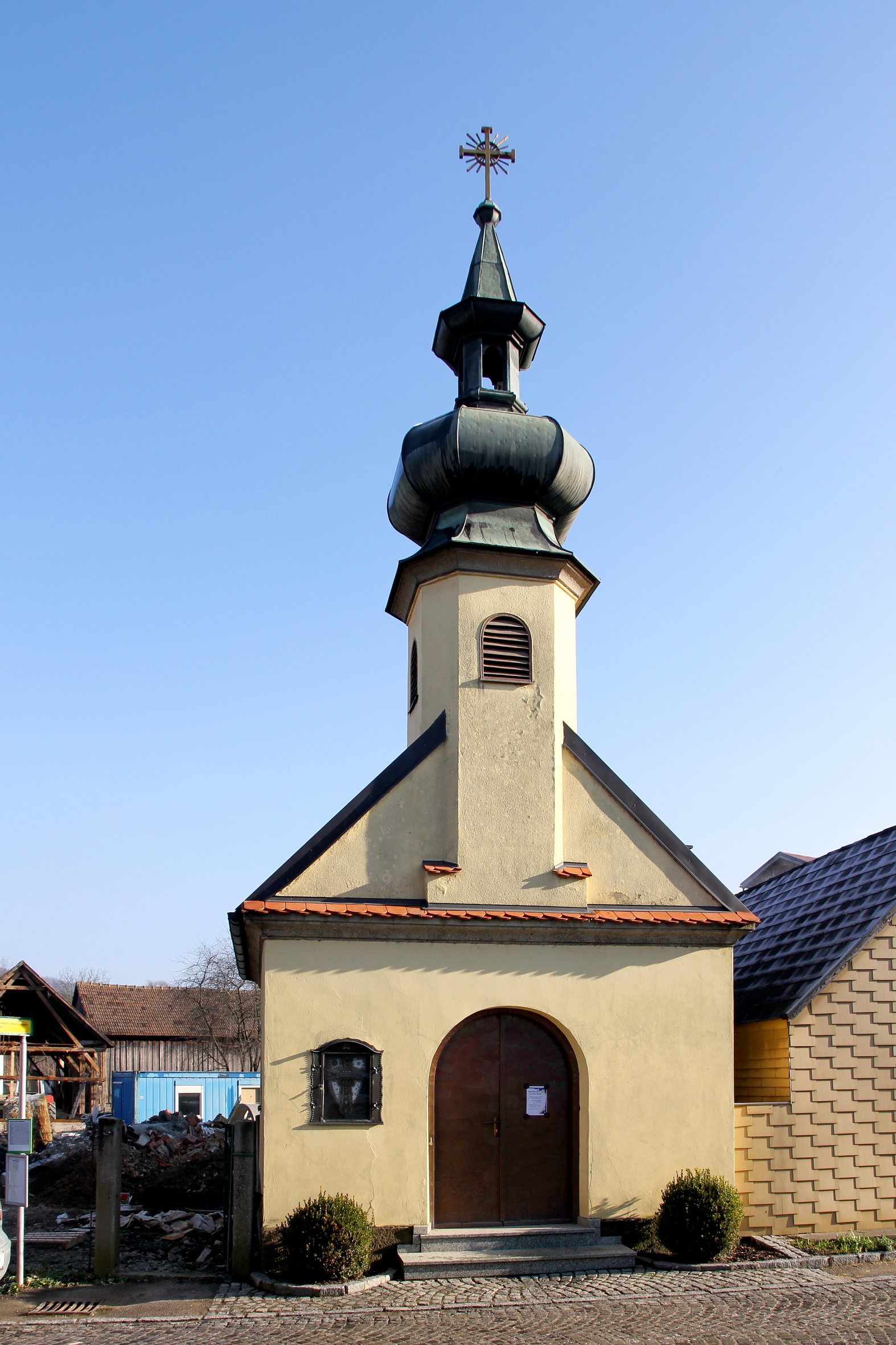 Ortskapelle hl. Margarethe in Siegersdorf, ein Ortsteil der niederösterreichischen Marktgemeinde Asperhofen. Ein neobarocker Bau, errichtet um 1860, mit Giebelreiter und hohem Zwiebelhelm.